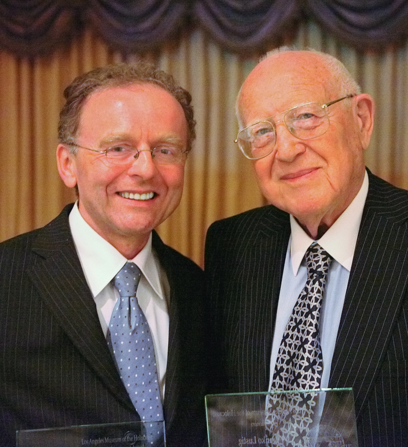 Andreas Maislinger und Branko Lustig beim 2nd Annual Dinner des LA Museum of the Holocaust